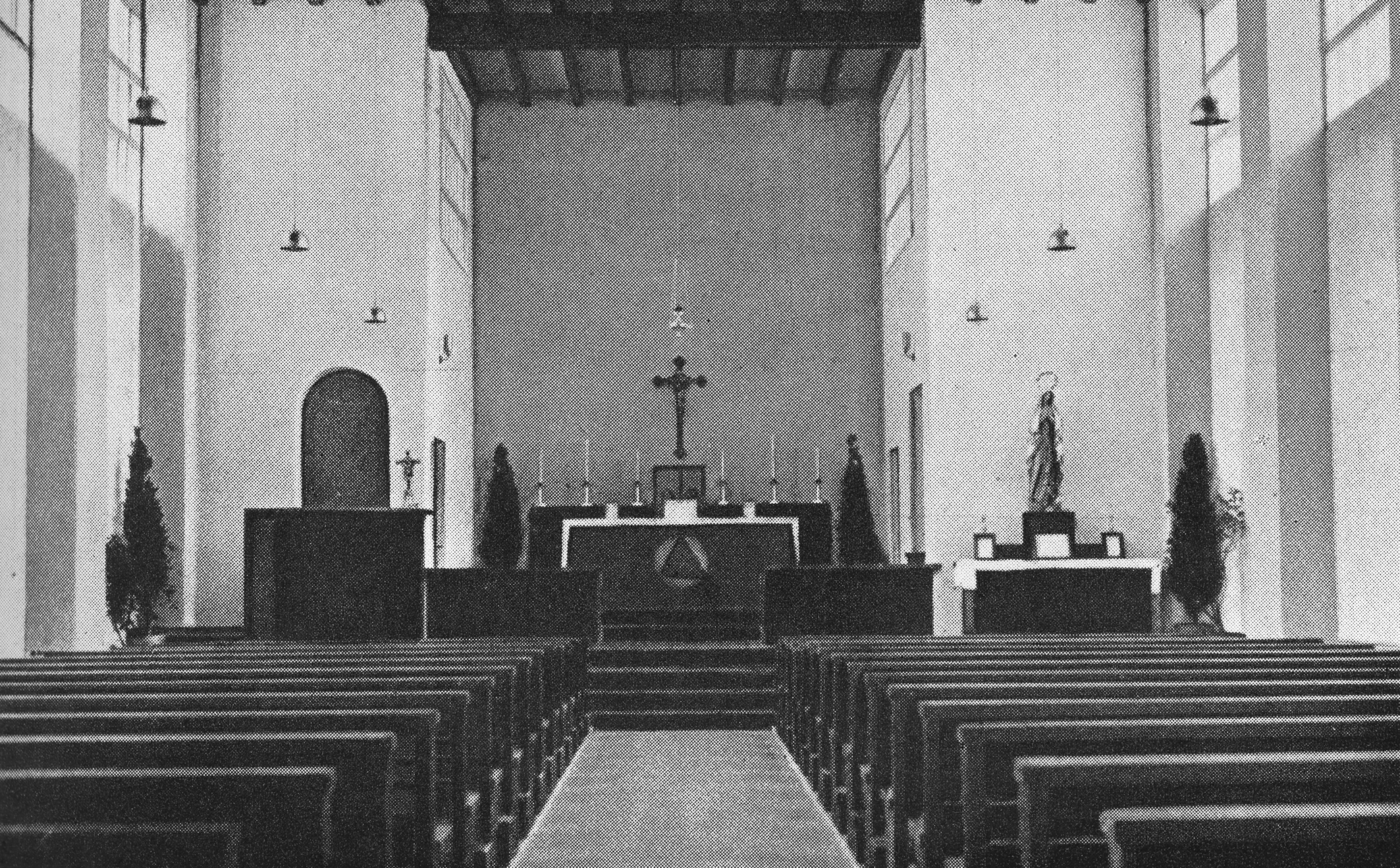 Römisch-katholische Kirche St. Katharina Zürich-Affoltern, erste Kirche von 1928, Innenaufnahme